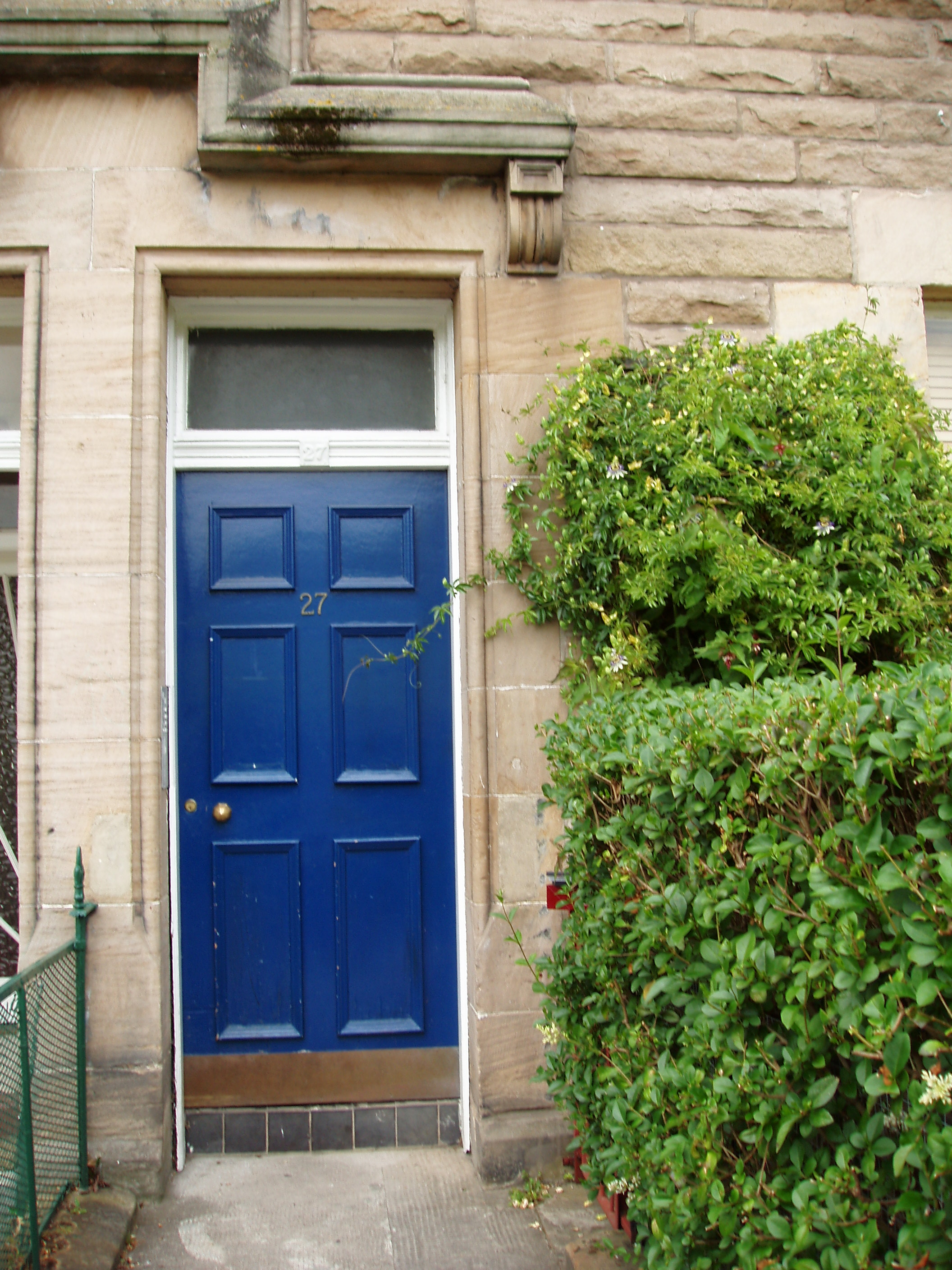 Front door